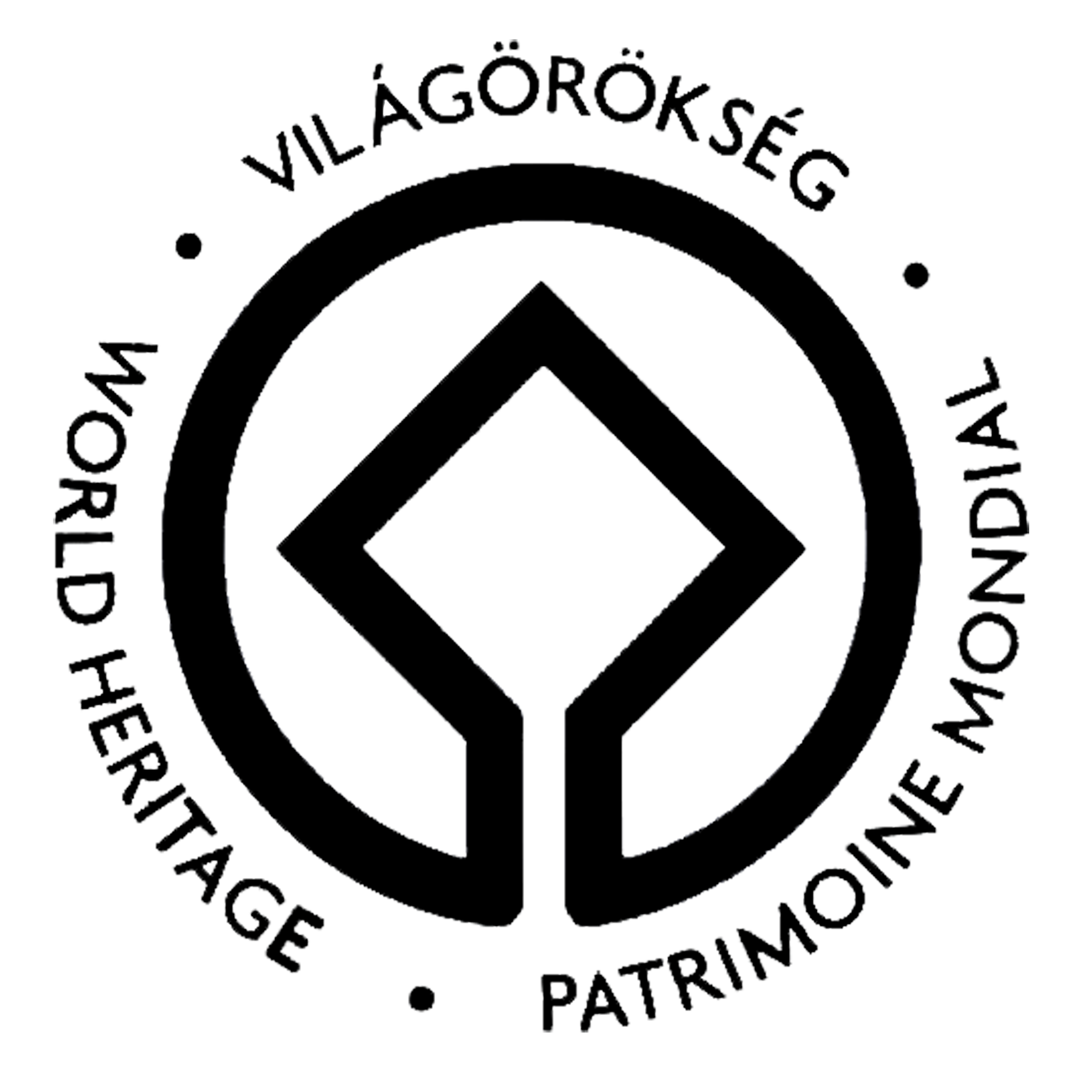 Világörökség logó